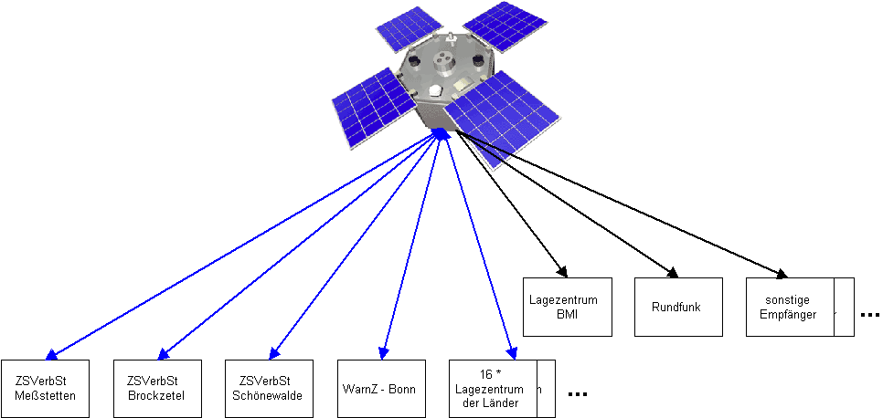 Schamatische Darstellung des SatWaS